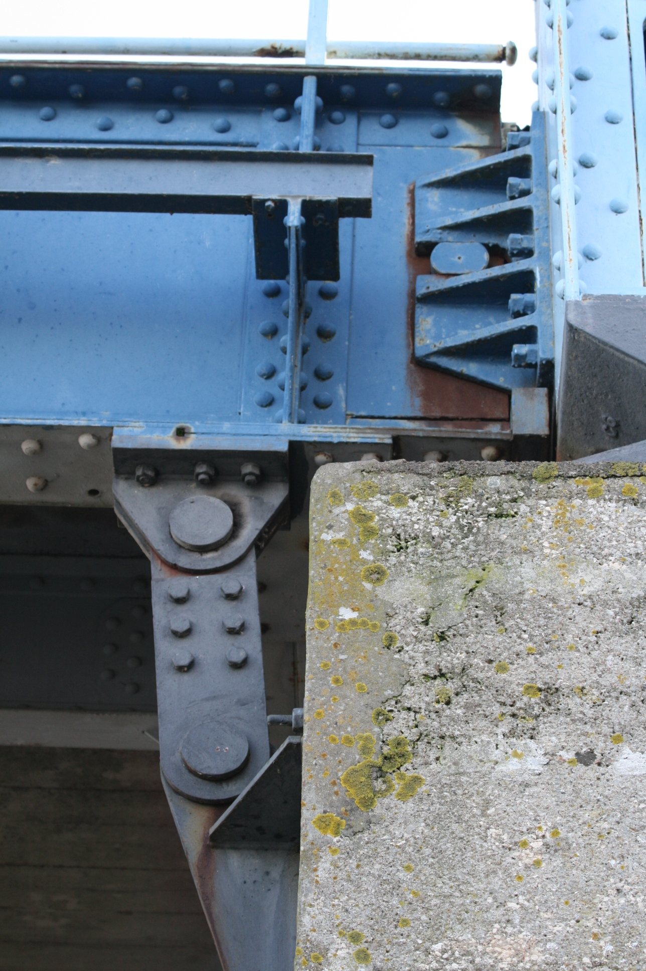 Pont de Châteauneuf-sur-Loire (Loiret - France)